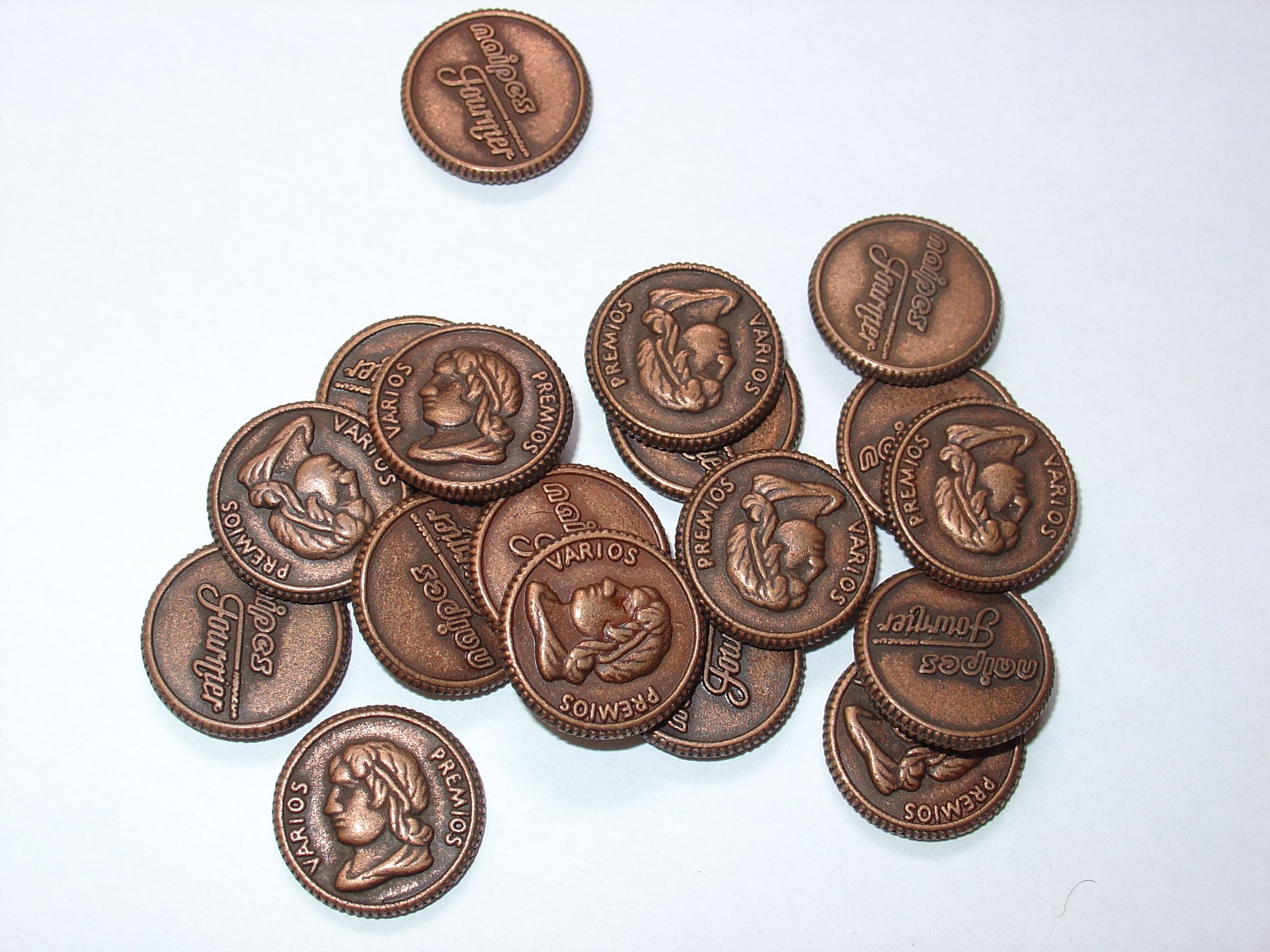 Piedras para jugar al mus; Heraclio Fournier.